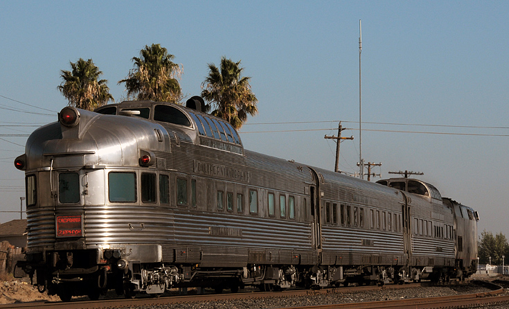 Wyche